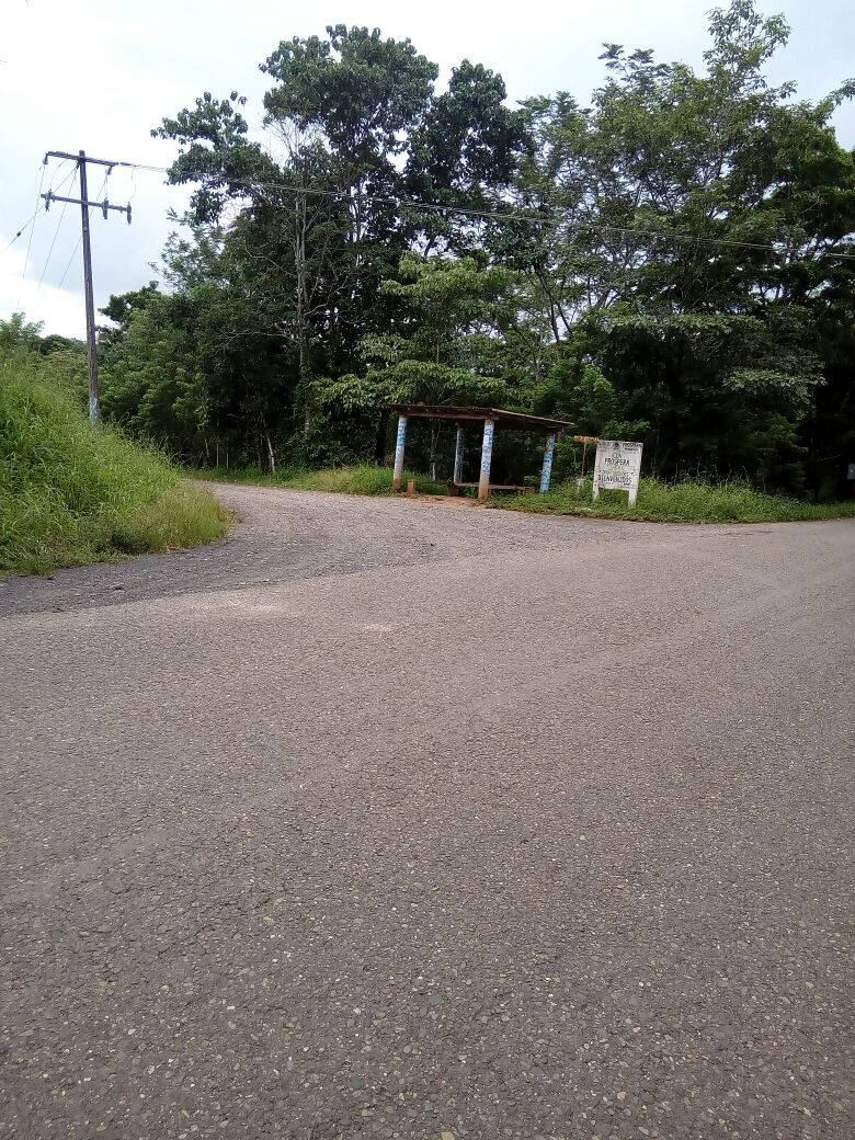 Paso del Tigre, la entrada a Juan de la luz Enriquez Jesus Carranza Veracruz